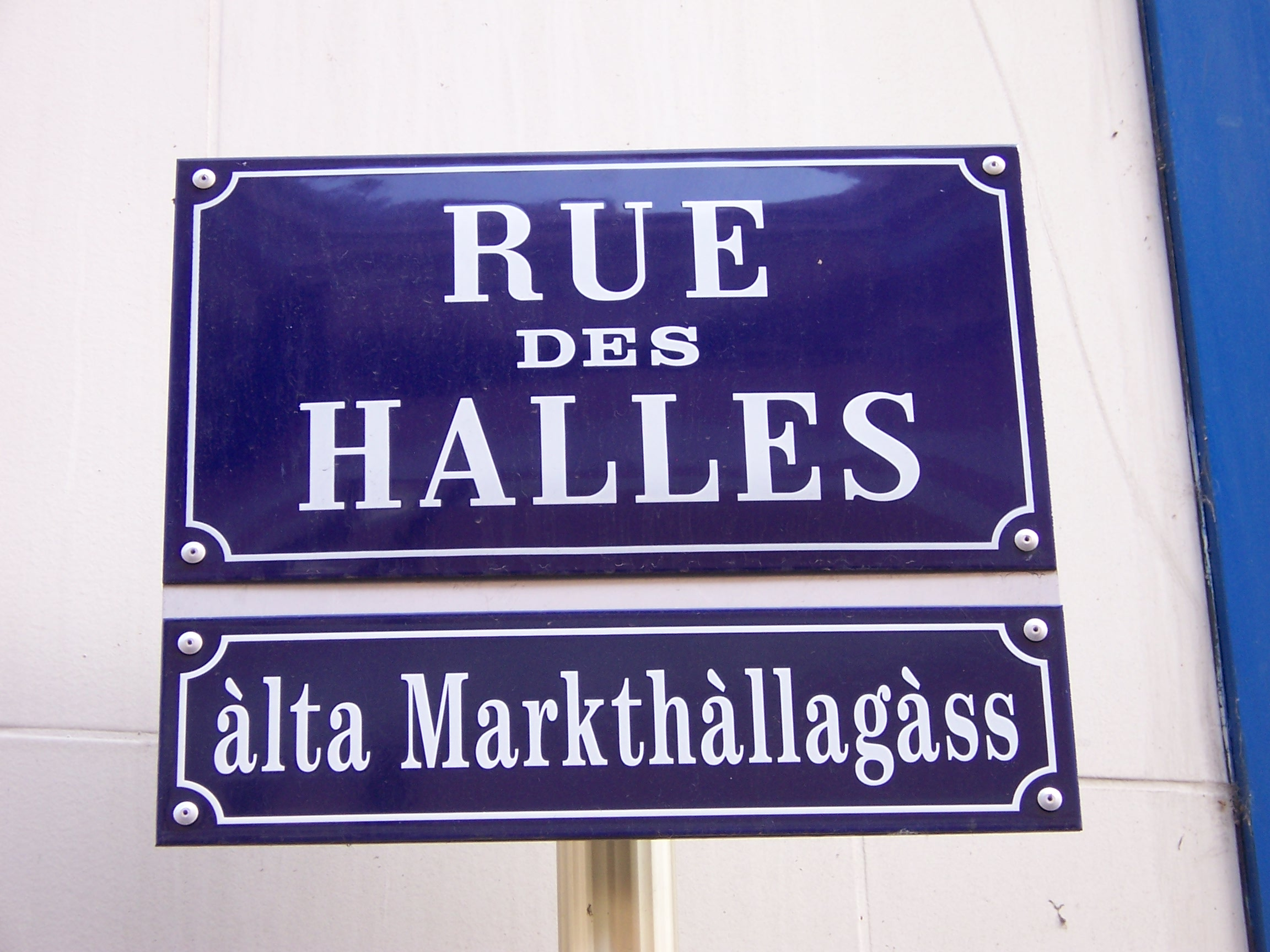 Milhüüse (Mulhouse): zweisprochi Strossaplàkàt (elsassisch, frànzeesch): els: àlta Markthàllagàss, fr: Rue des Halles